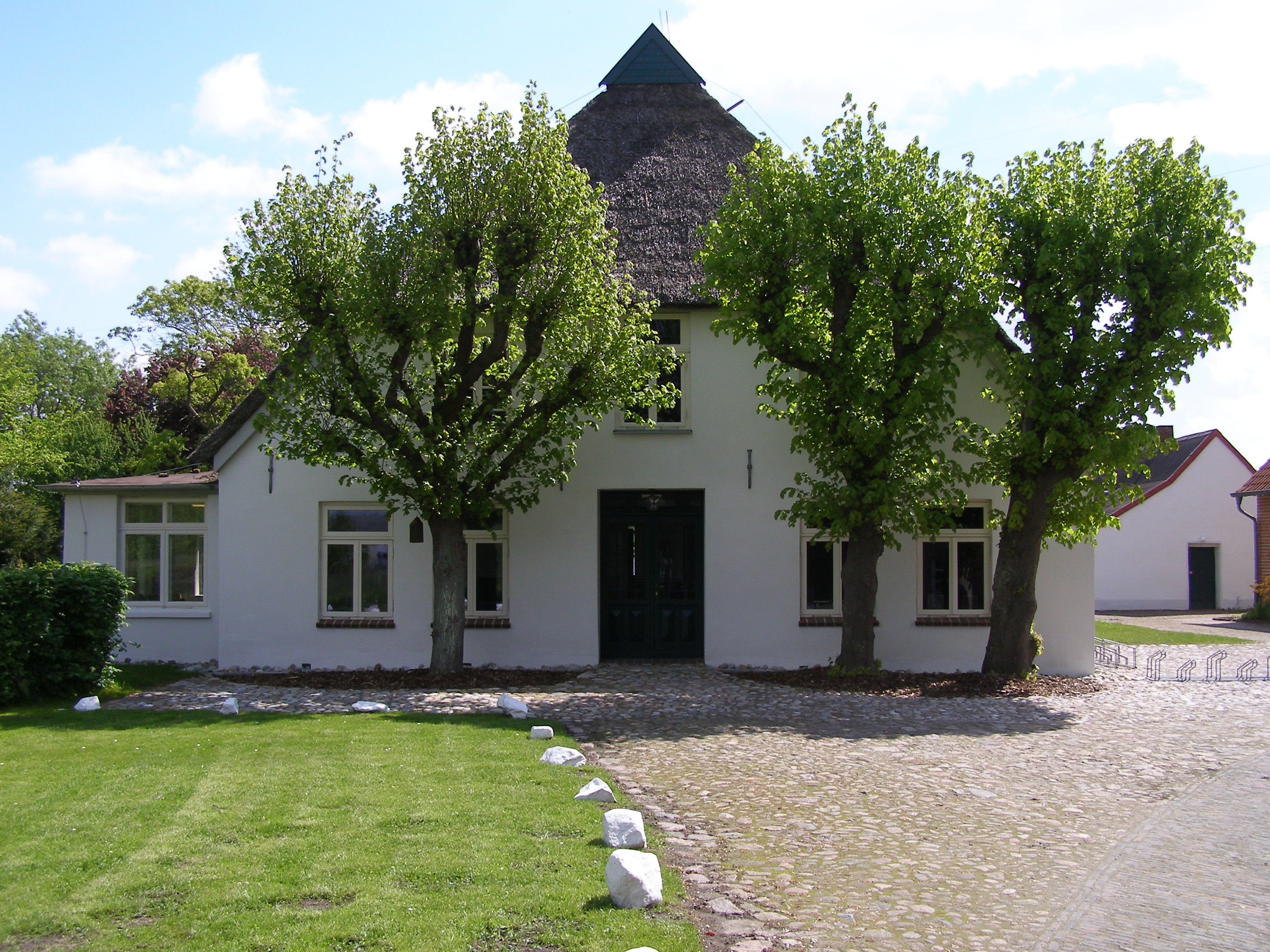 Das Müllerhaus am Museum Moorseer Mühle in Nordenham-Abbehausen. Bild: Archiv Museum Moorseer Mühle